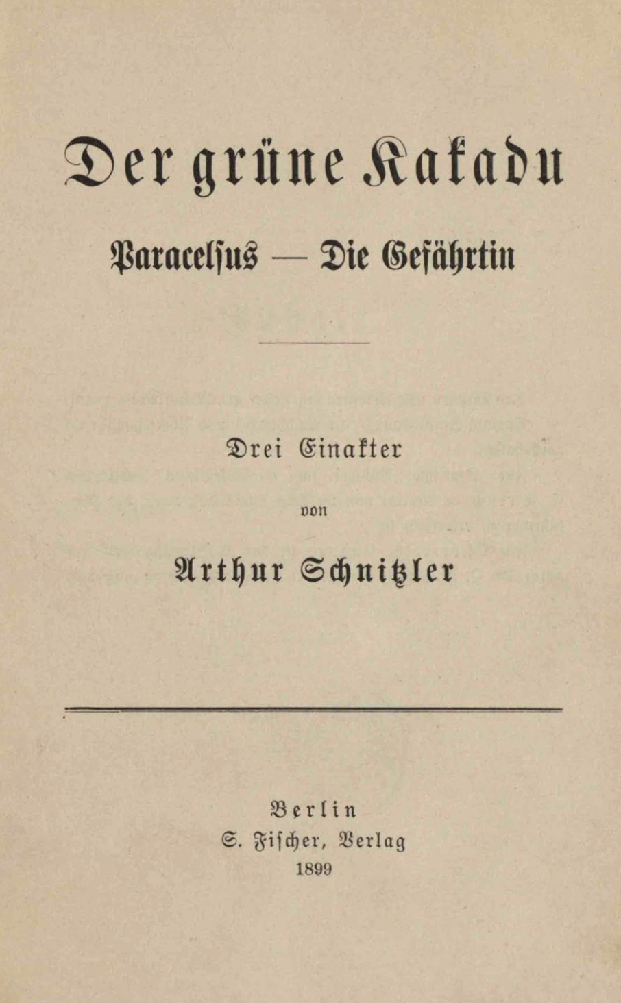 Arthur Schnitzler: Der grüne Kakadu. Paracelsus. Die Gefährtin. Drei Einakter. Berlin: S. Fischer 1899, Titelblatt